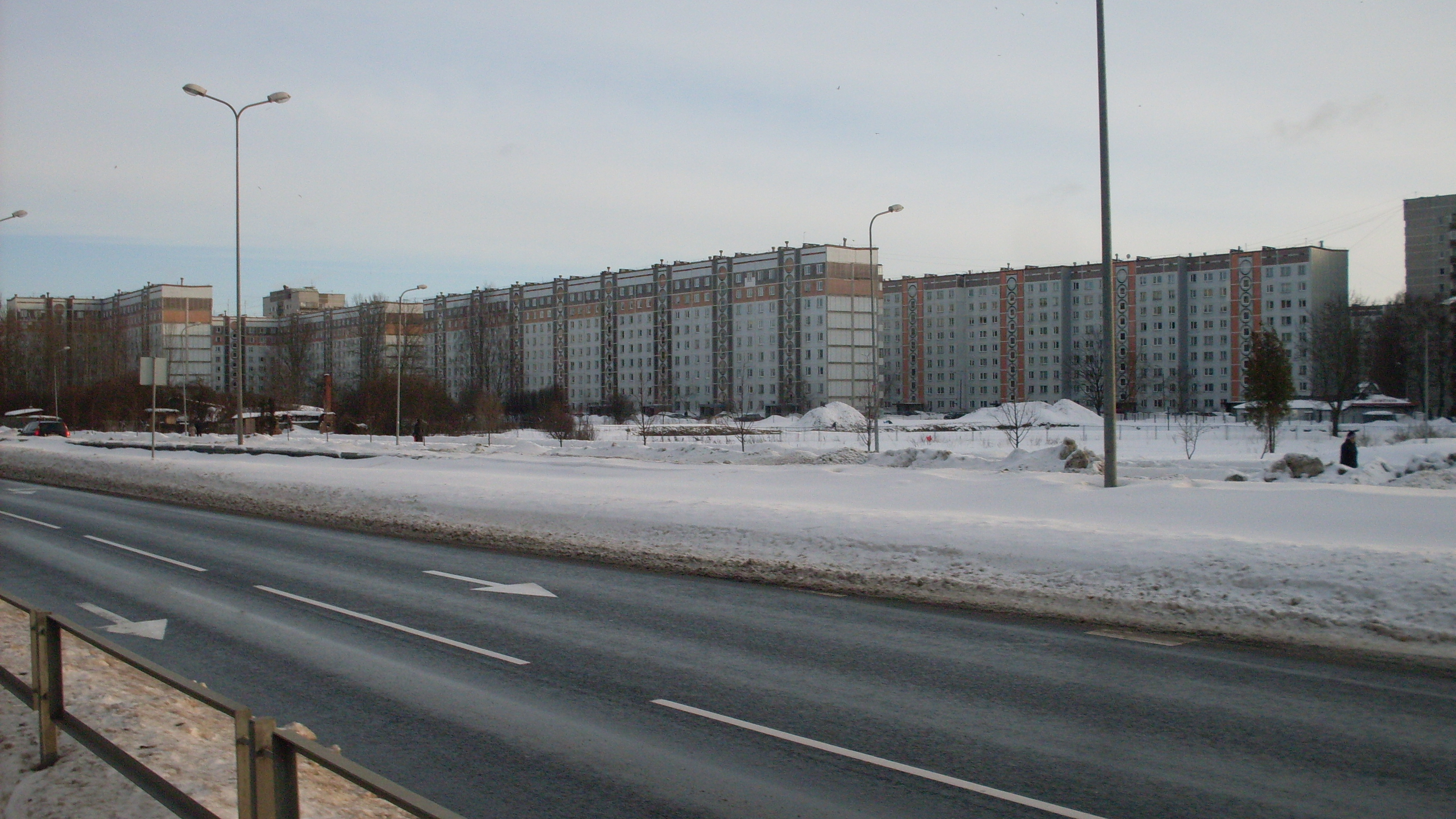 Pļavnieki, Latgale Suburb, Riga, Latvia